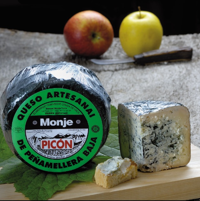 Bodegón realizado con Monje Picón en el folleto Quesos del Oriente de Asturias financiado por el LEADER.